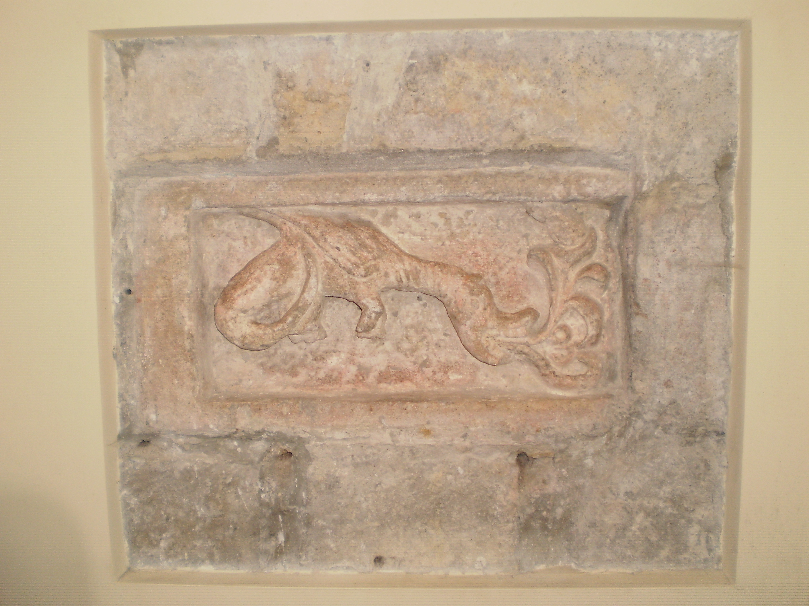 Церква Успіння Пресвятої Богородиці, Крилос